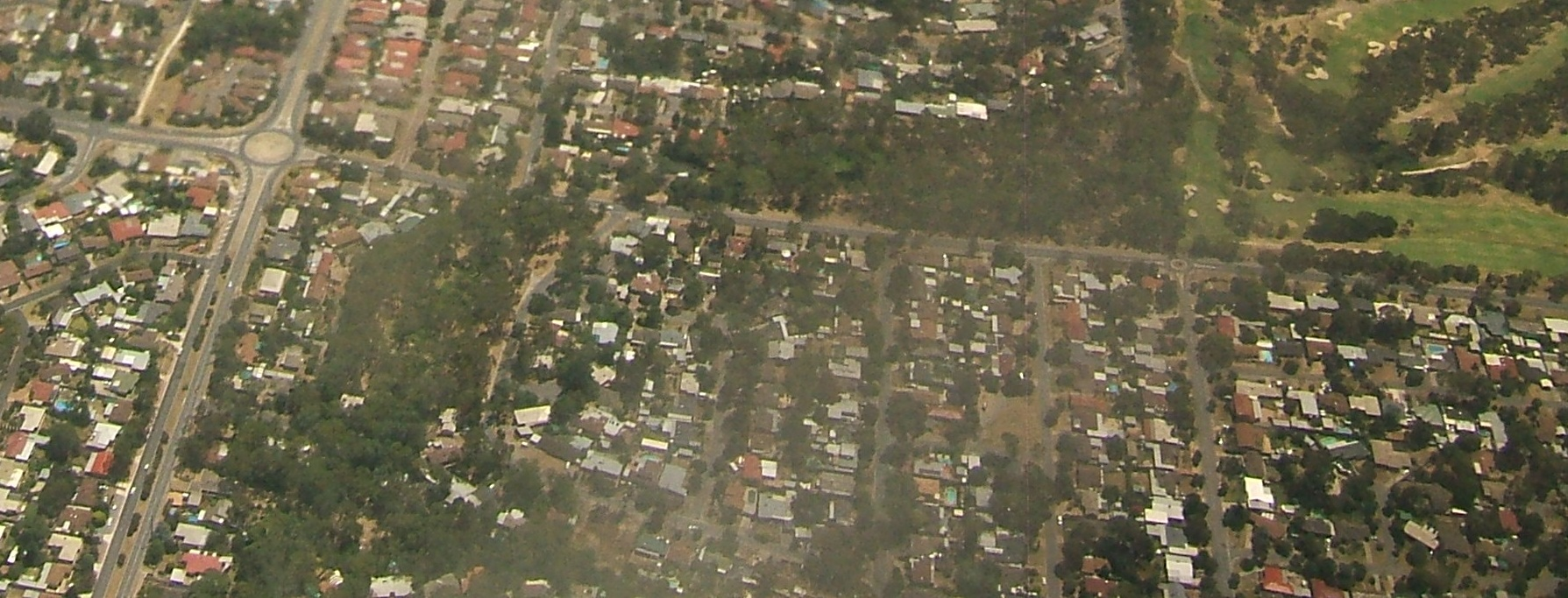 Banksia Park aerial view, Adelaide